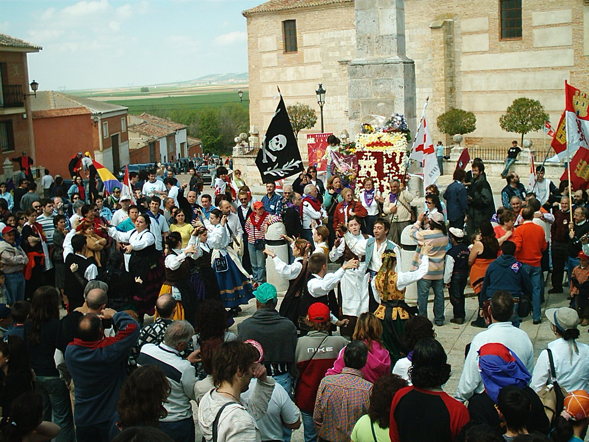 Estampa de la ofrenda floral ante el monolito erigido en honor a los Comuneros